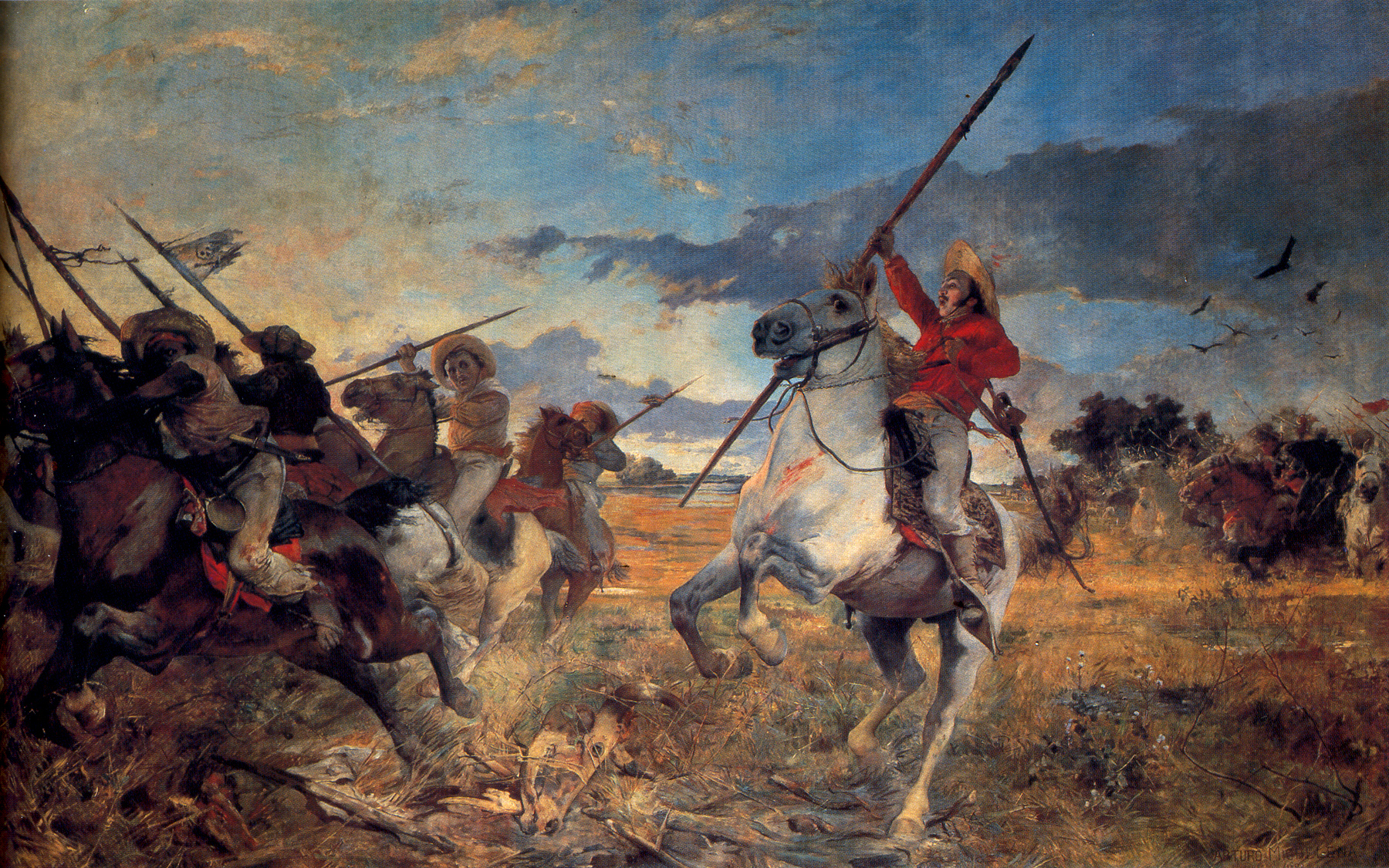 Vuelvan Caras es una pintura de Arturo Michelena donde relata un episodio de la Batalla de Las Queseras del Medio, en el momento en que José Antonio Páez ordena a sus jinetes dar la vuelta para atacar a la caballeria española que los perseguía.